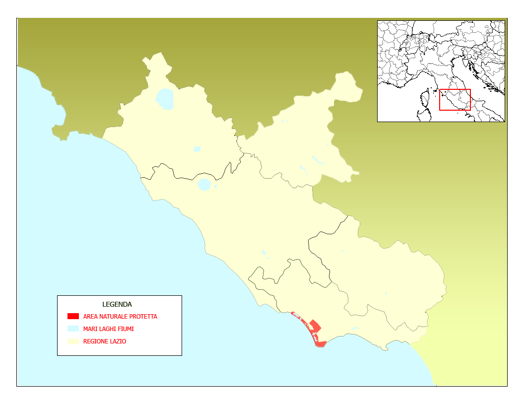 Mappa Parco del Circeo, Lazio, Italia